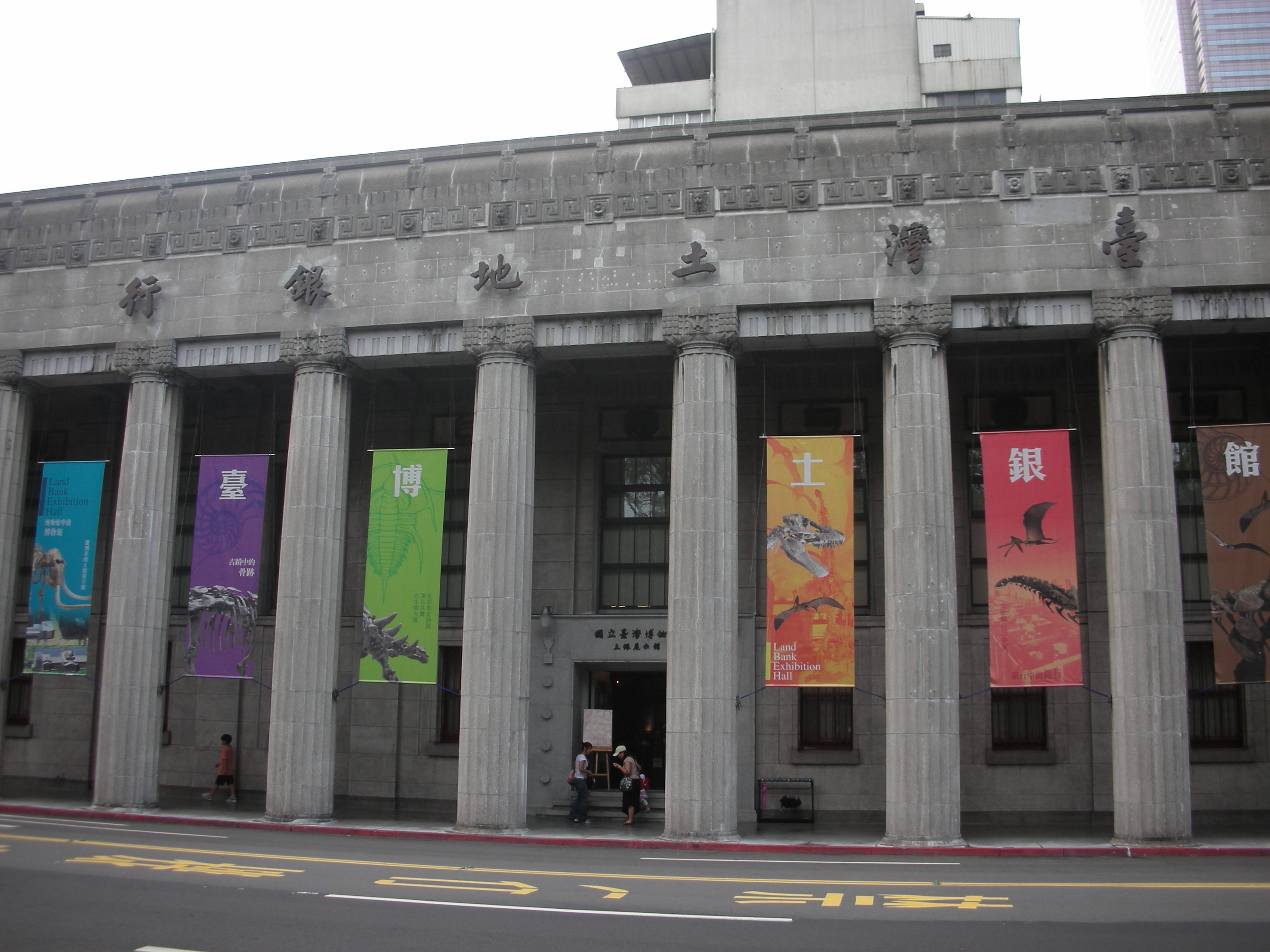 國立臺灣博物館土銀展示館。